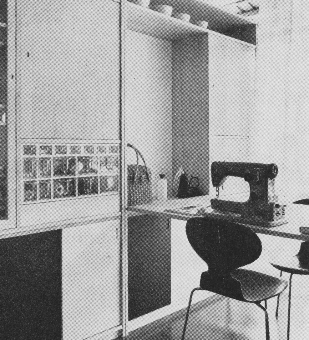 Enfamiljshuset "Skal och kärna", allrummet